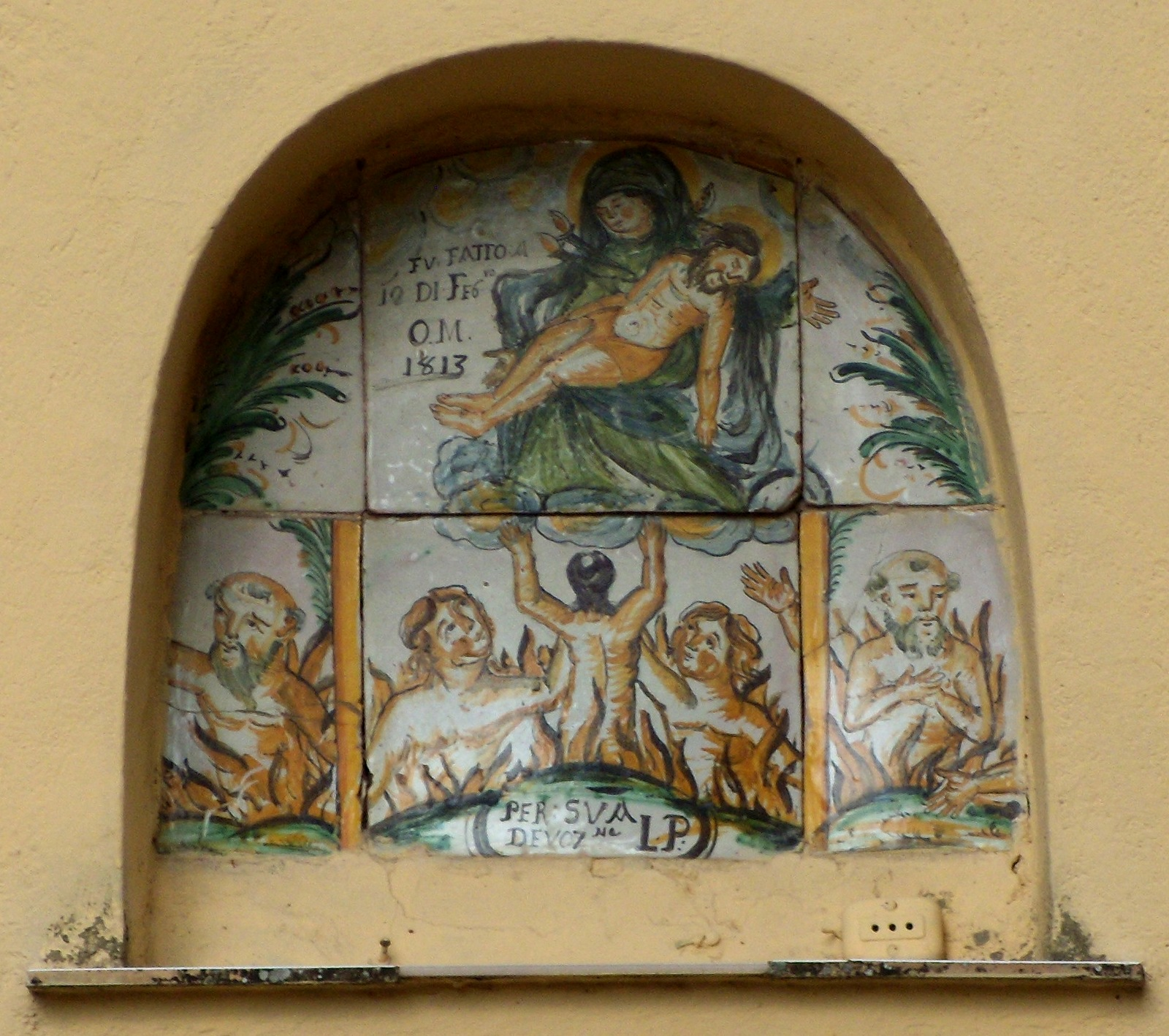 Particolare di una edicola in ceramica cerretese del 1813 a Puglianello (Italia).